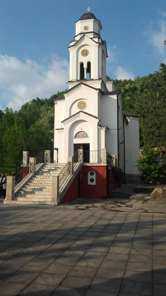 Српски (ћирилица): Манастир Свете Петке у Стублу